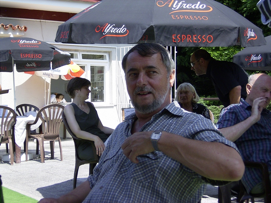 Antonín Bajaja